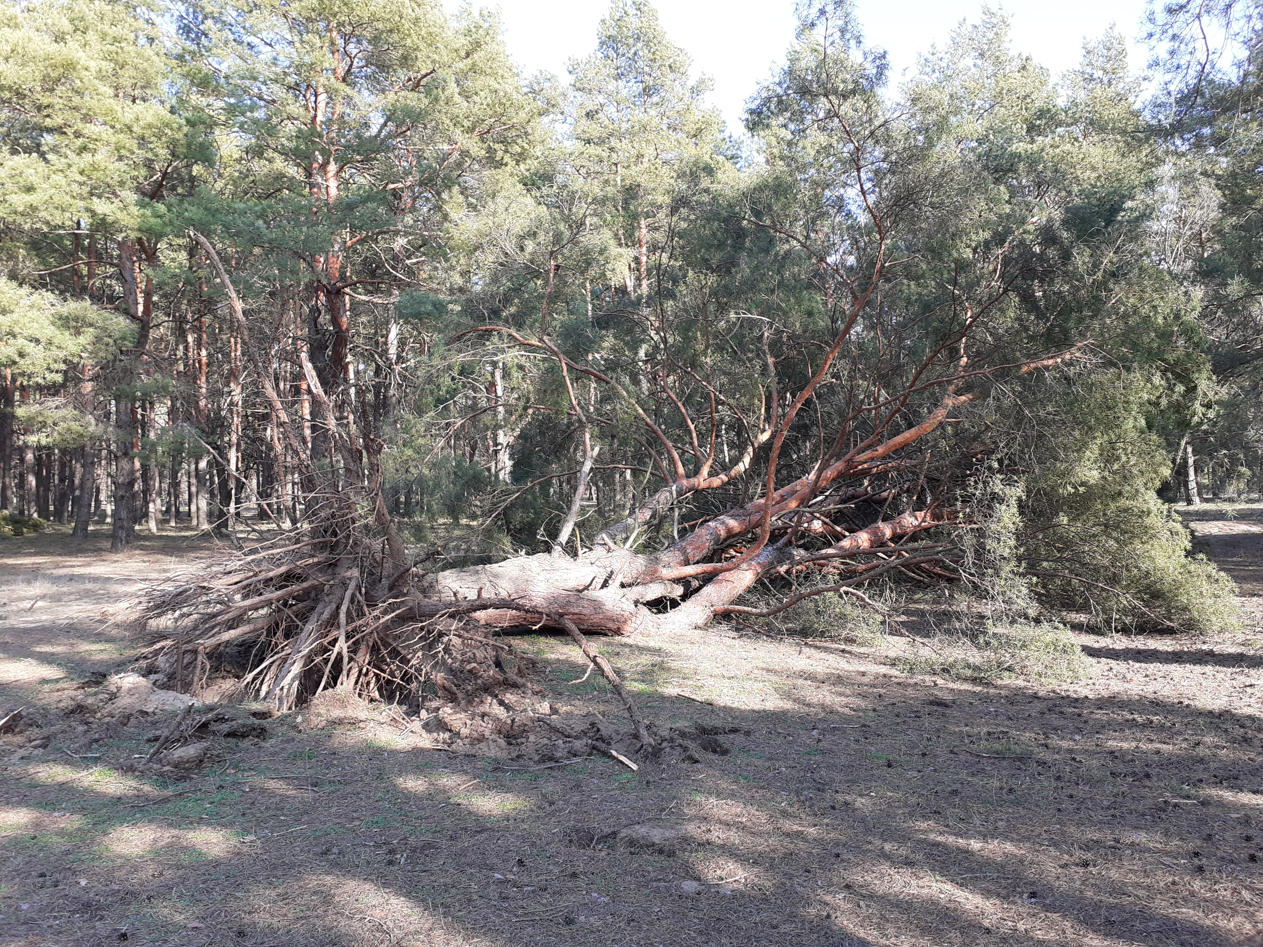 Сона впала після буревію, Миколаїв